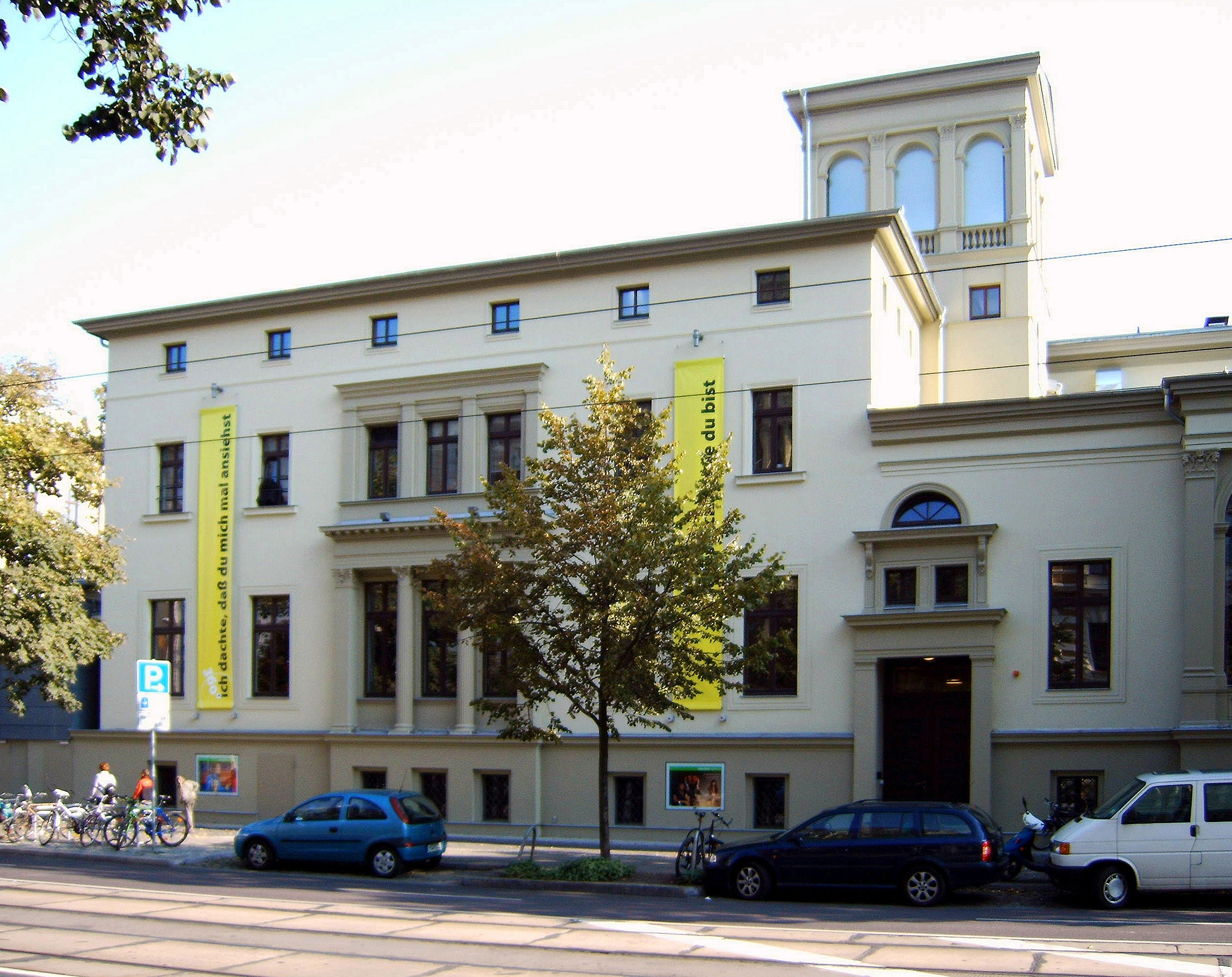 Schauspielhaus Magdeburg, Westseite.